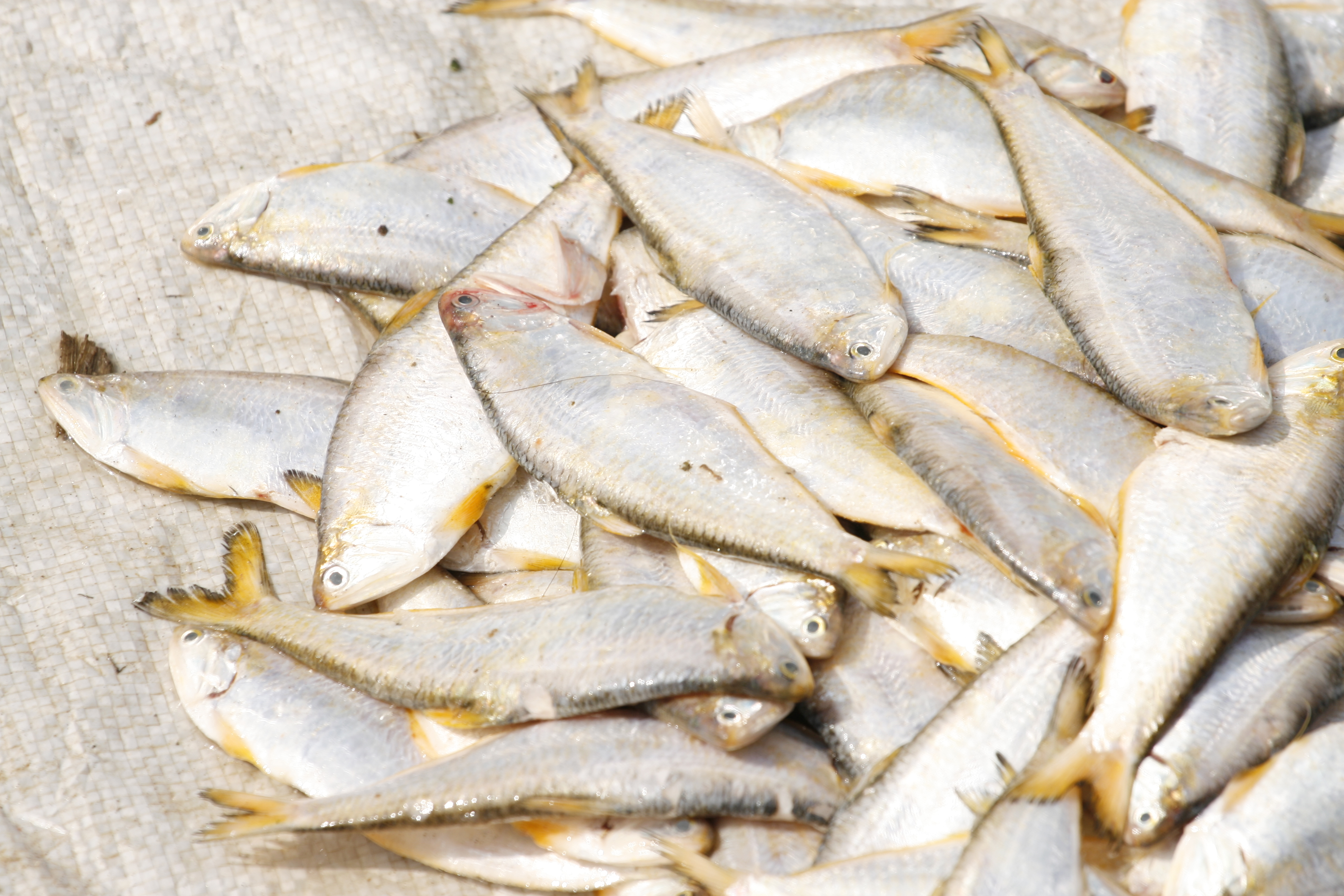 Cá Mòi, một loài cá biển gần gũi với Cá Chích.